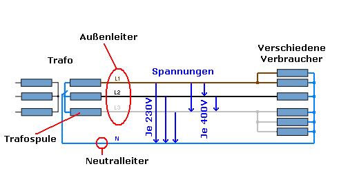 Erklärung zum Drehstrom. (Was sind Außenleiter, Neutralleiter, usw.)